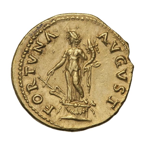 Веспасиан (69—79). Ауреус. Ок. 74 г. Рим. Реверс. Надпись FORTVNA AVGVST. Фортуна (персонификация удачи) стоит на алтаре, влево; в руках руль и рог изобилия.